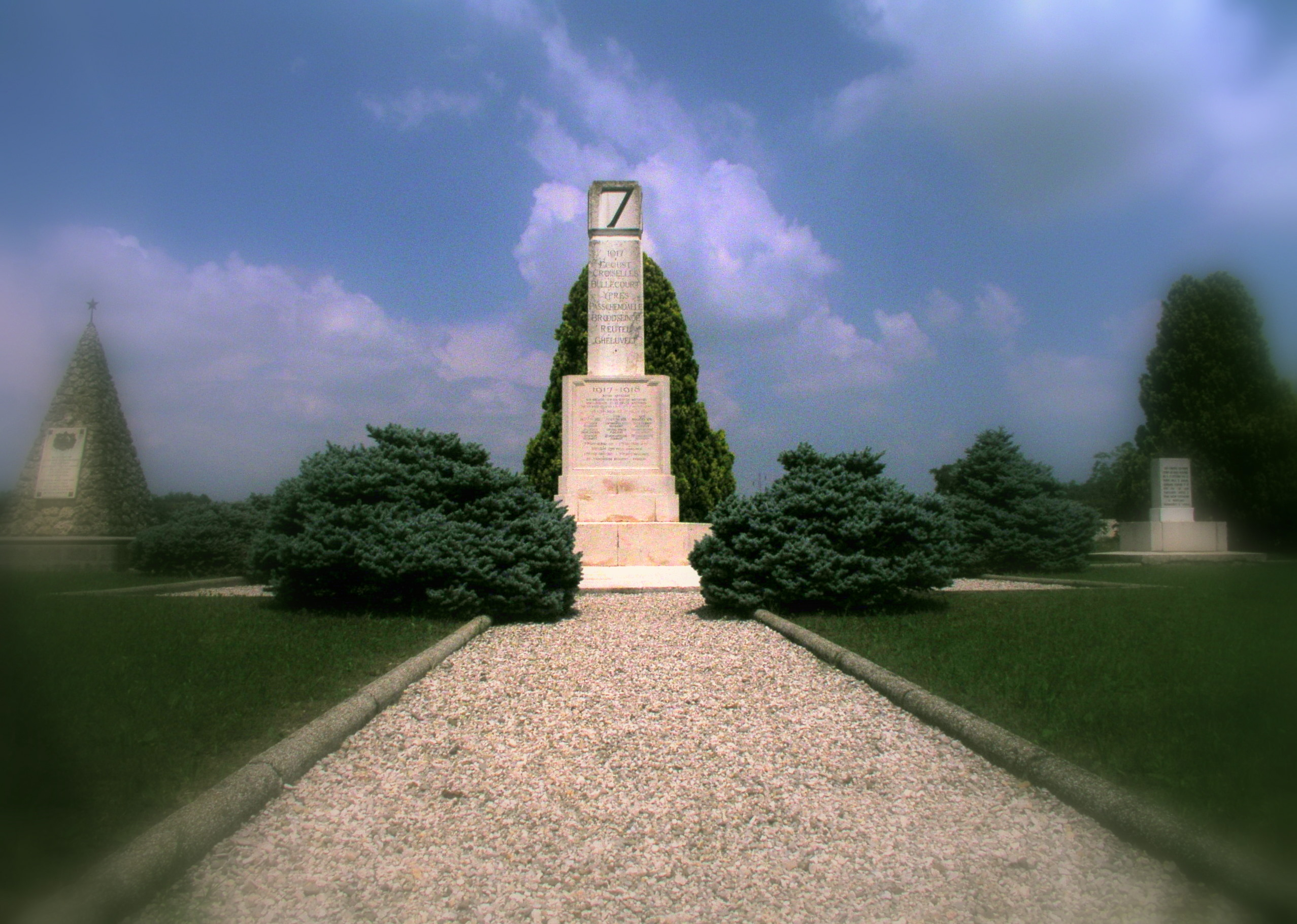 Monumento ai caduti inglesi a Salettuol di Maserada sul Piave; la piramide sulla sinistra è il monumento ai caduti italiani